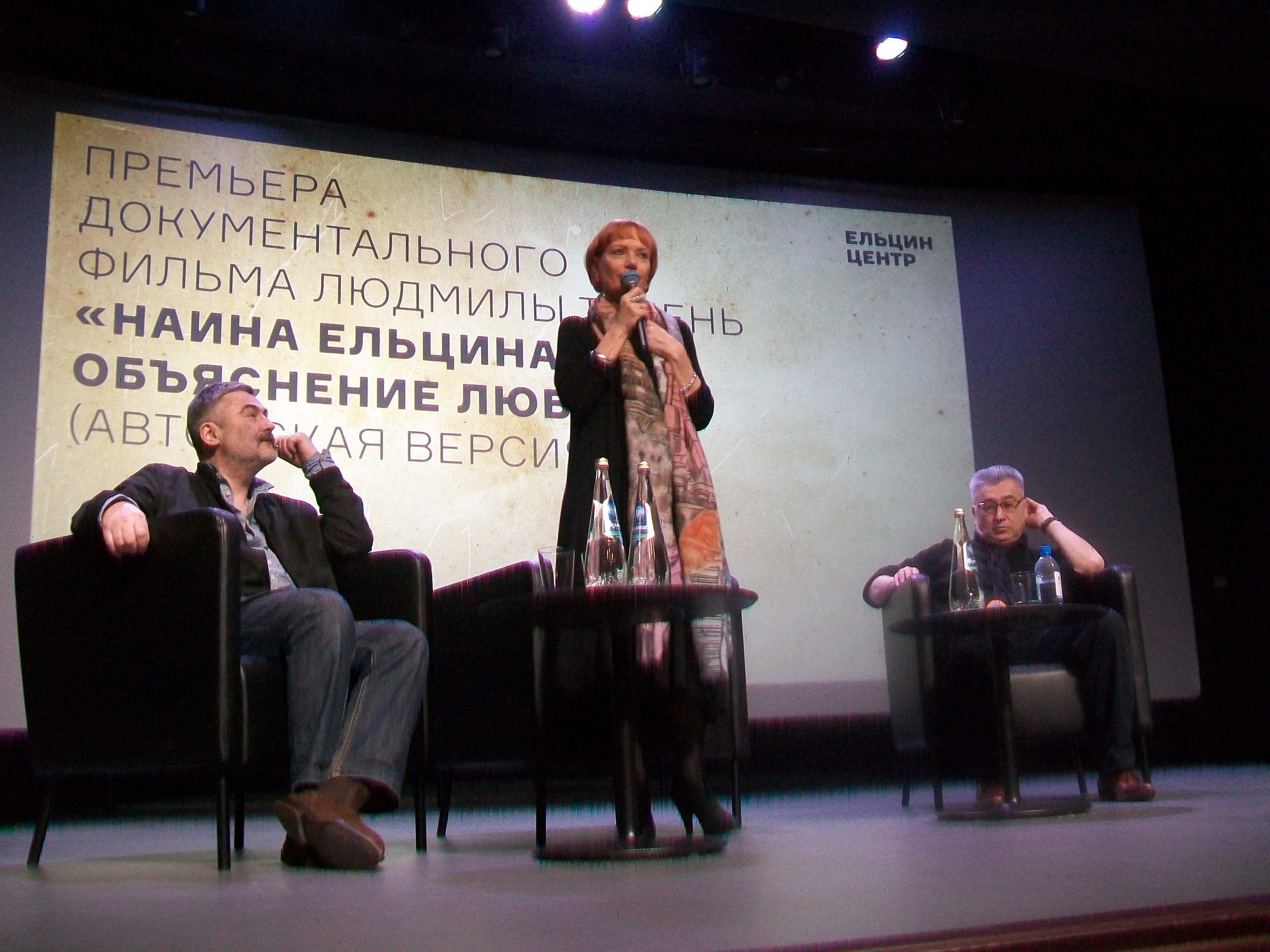 Людмила Телень со съемочной группой фильма "Наина Ельцина: объяснение любви"